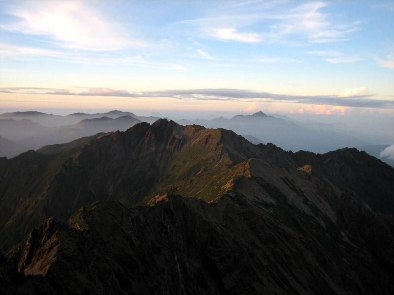 Yu Shan Summit Trek